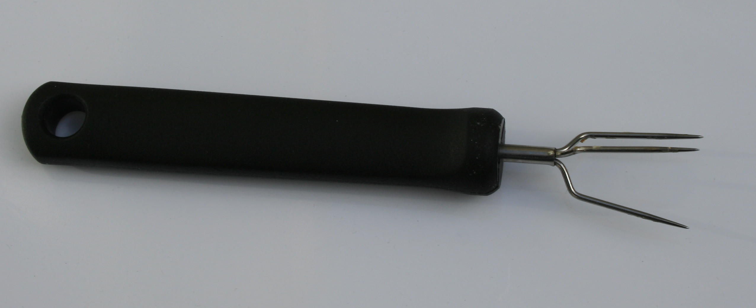 Pellkartoffelspieß